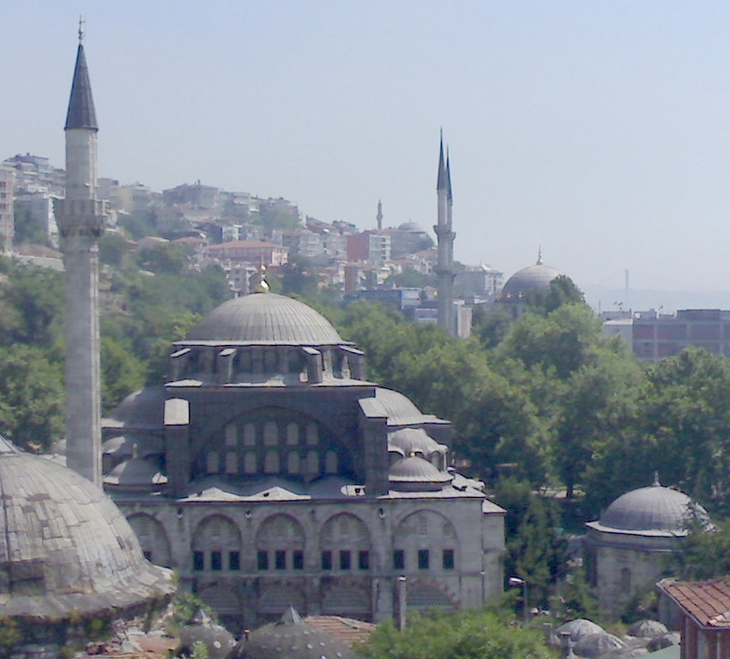 View_of_Kılıç Ali Paşa Mosque_in_Istambul_from_Gulu_Oglu_baklava_fabrika